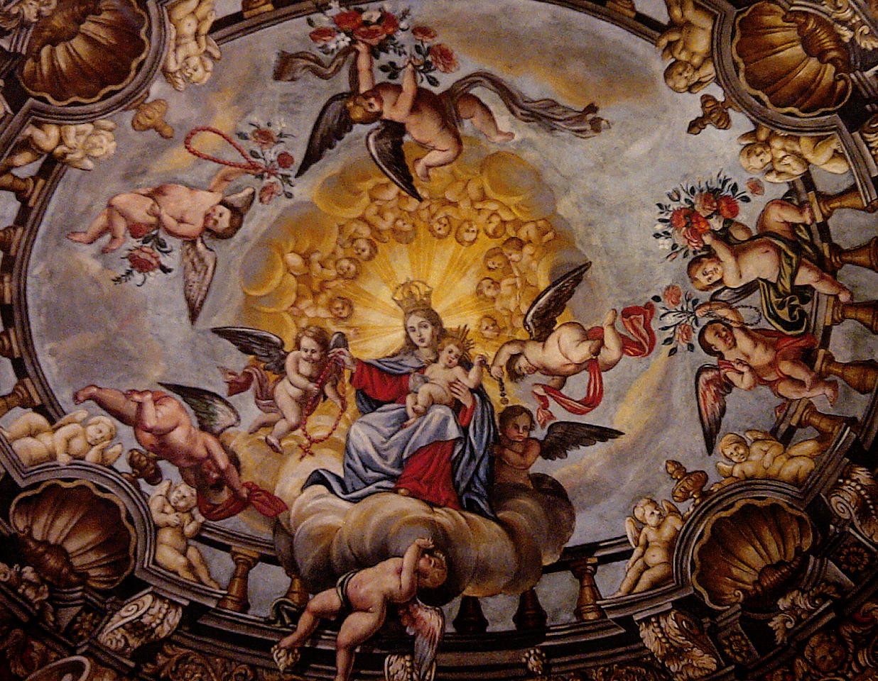 Pinturas de la capilla del Rosario de la iglesia arciprestal de Vinaròs, realizadas por el pintor Eugenio Guilló